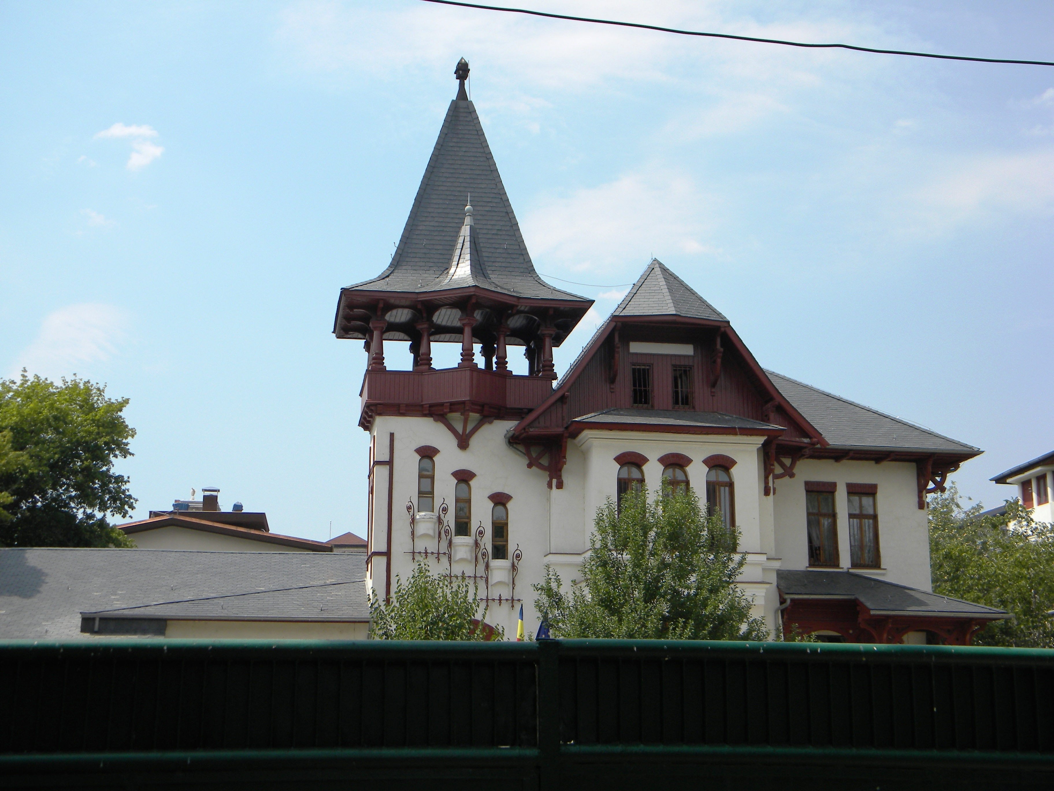 Casa Vasile Ganescu pe Sos. Kiseleff nr. 9, Bucuresti, sect. 1